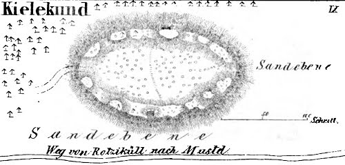 Kihelkonna maalinn